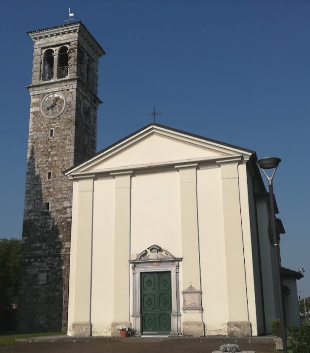 La chiesa parrocchiale di Bagnaria Arsa, con vicino il campanile